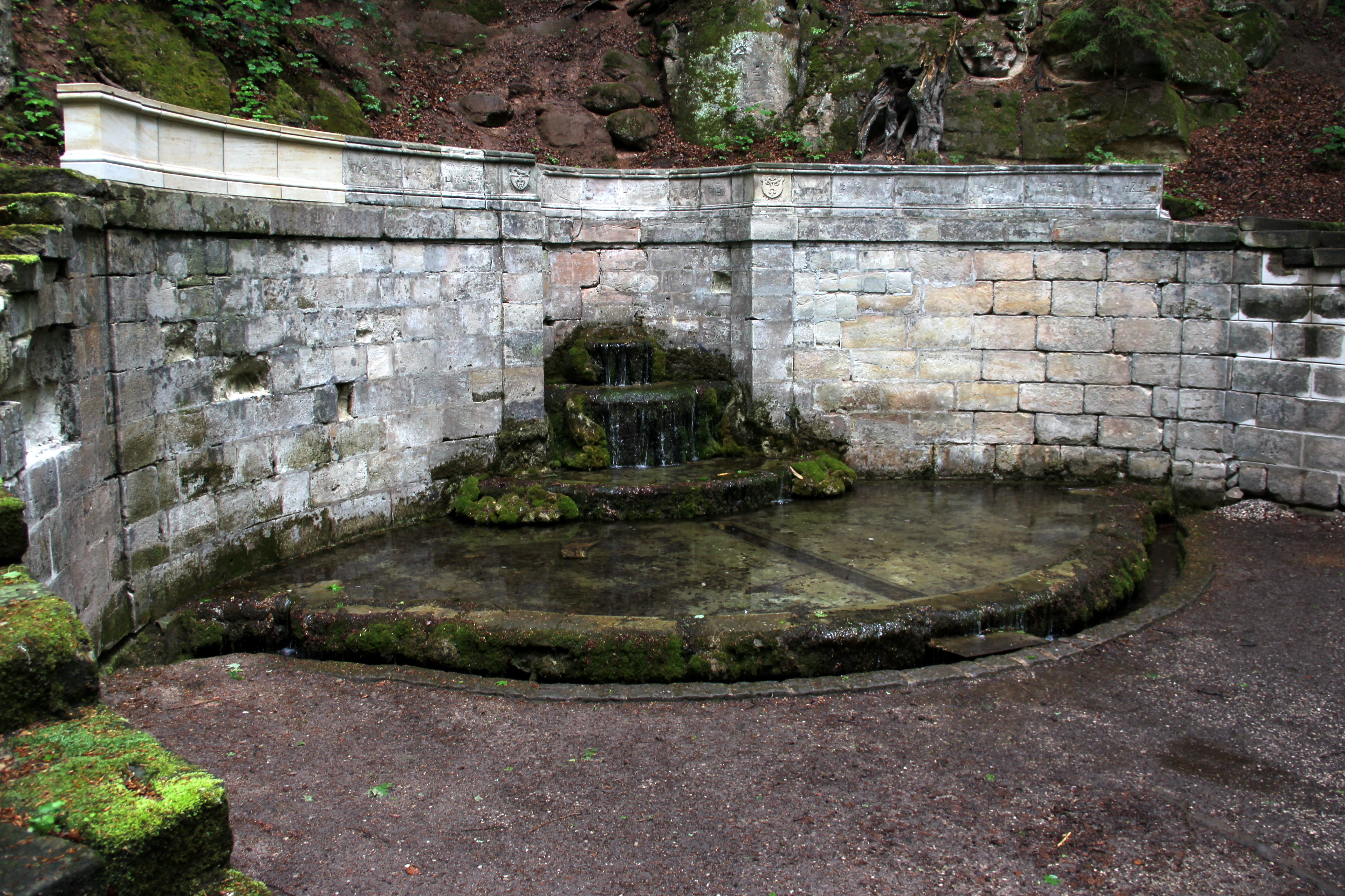 Sophienquelle von Grünsberg